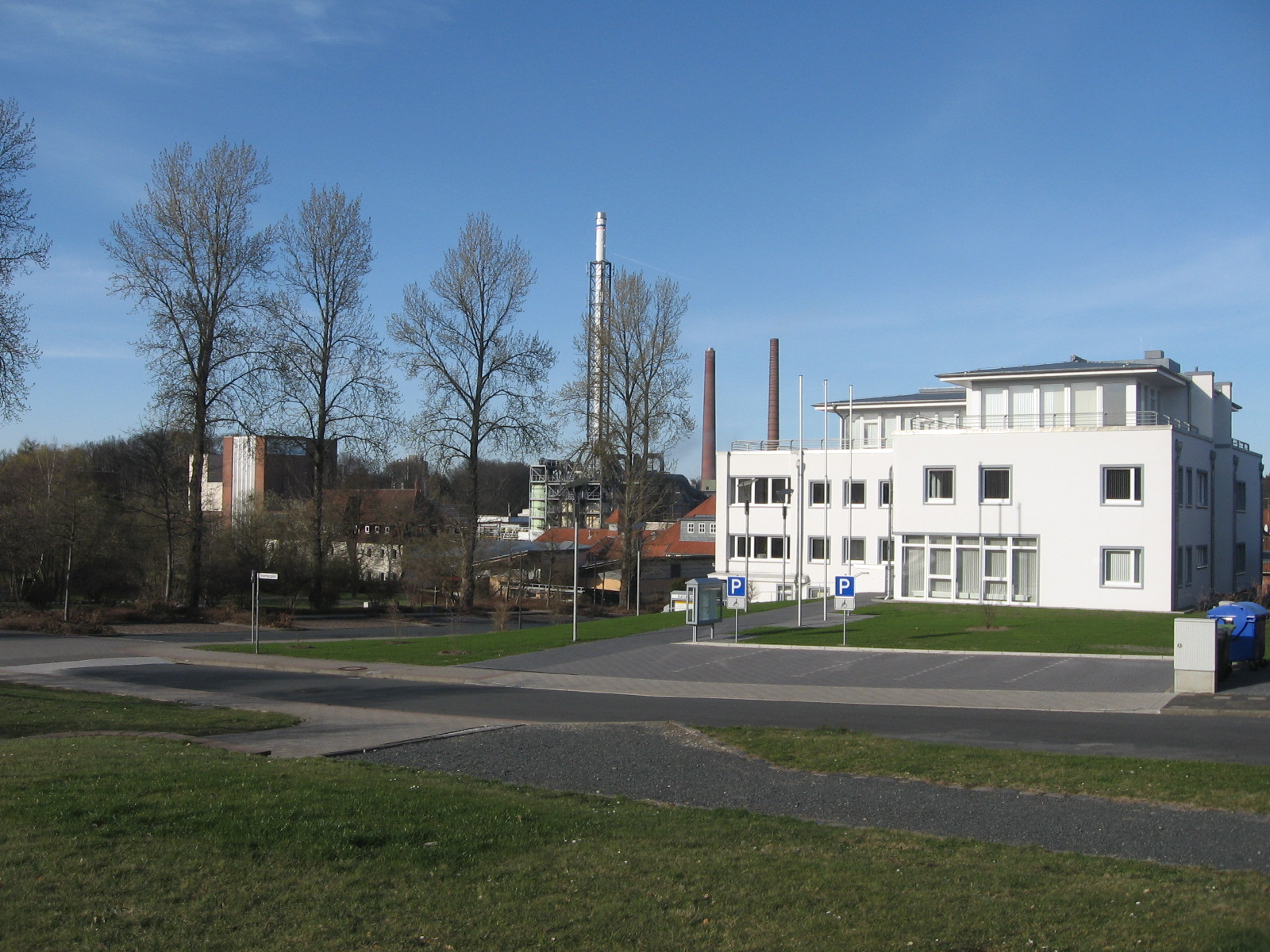 Neues Rathaus und Industriepark